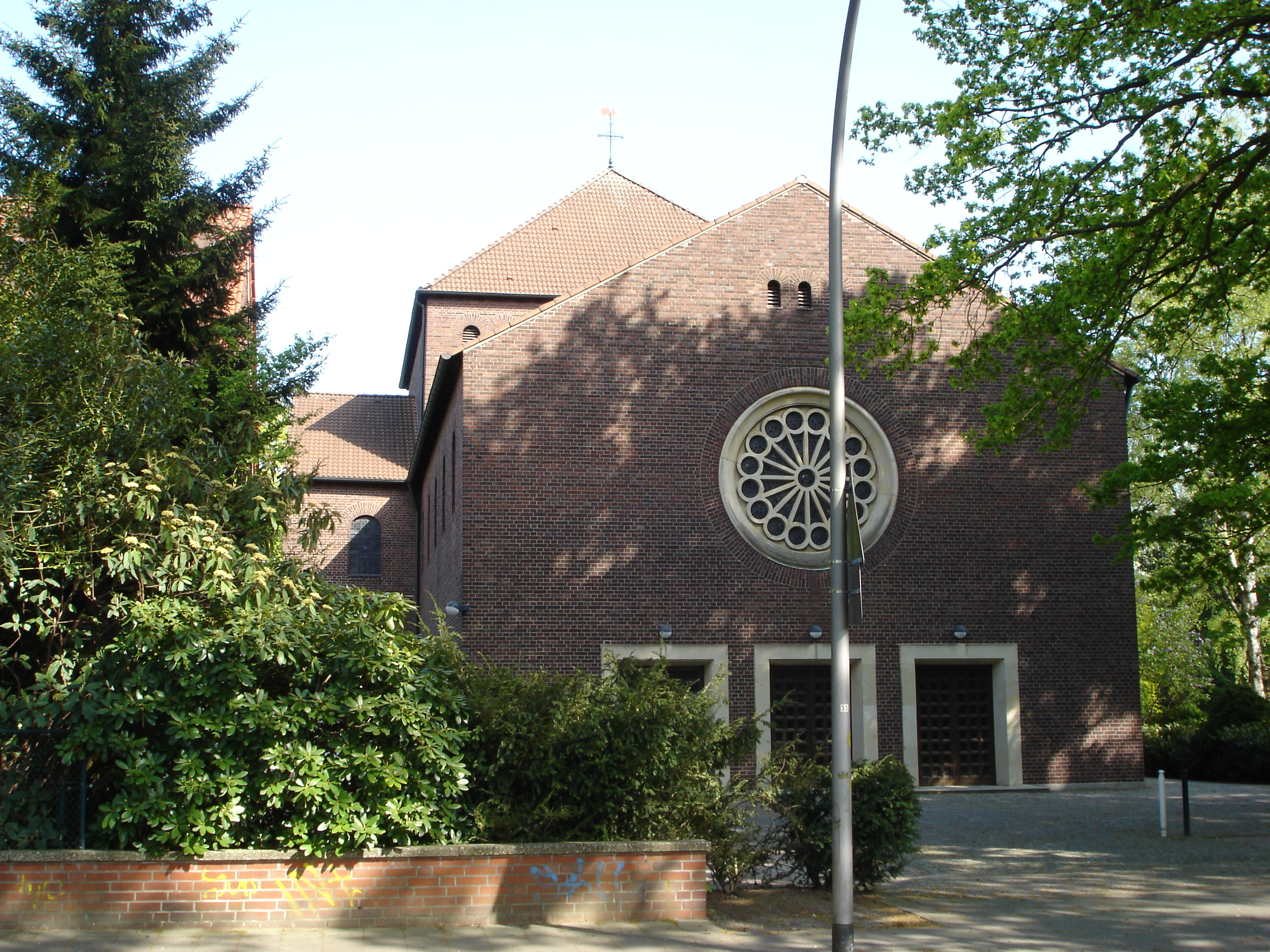 Westansicht von St. Konrad in Münster, Germany